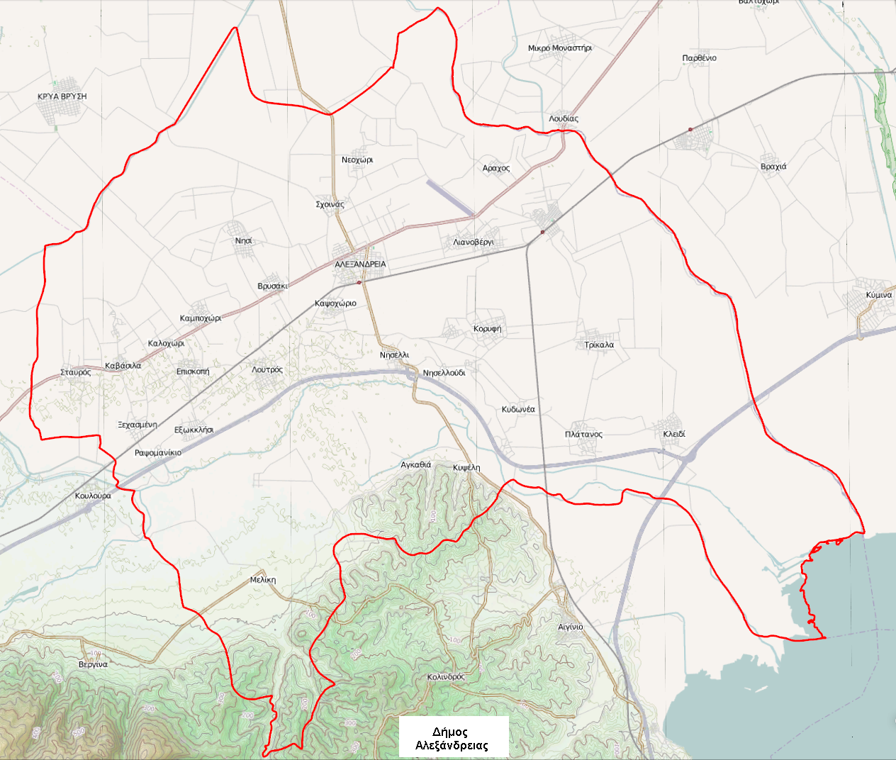 Τοπογραφικός χάρτης του Δήμου Αλεξάνδρειας